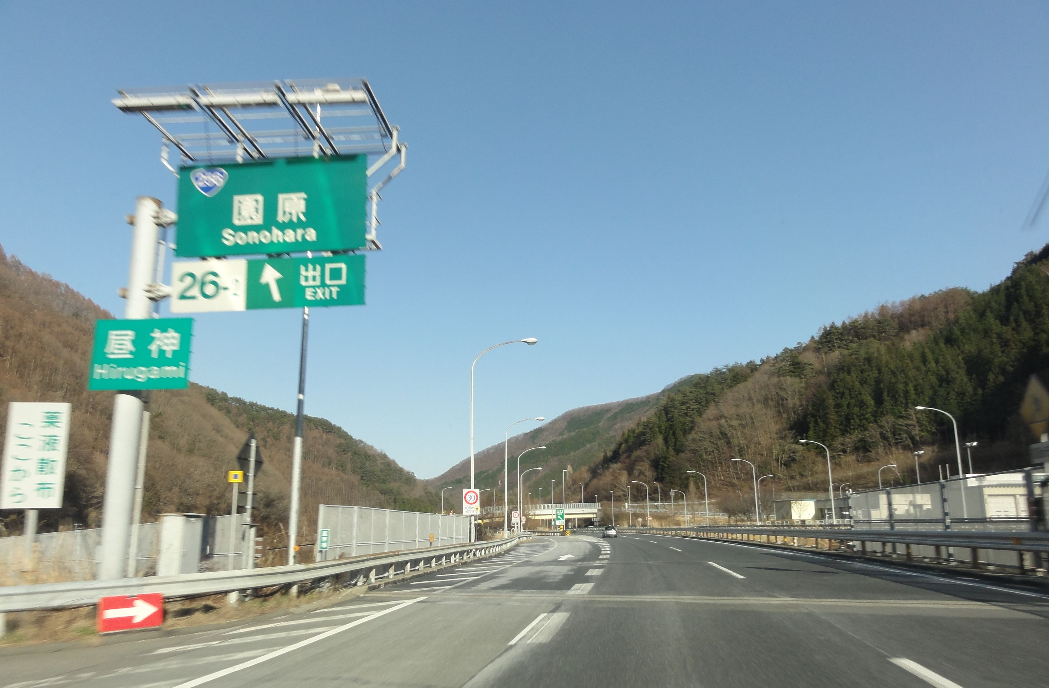 Chuo-Expressway 園原インターチェンジ